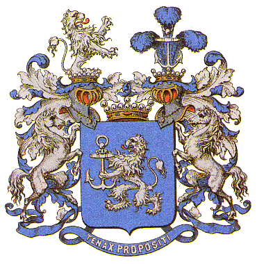 Vaakuna